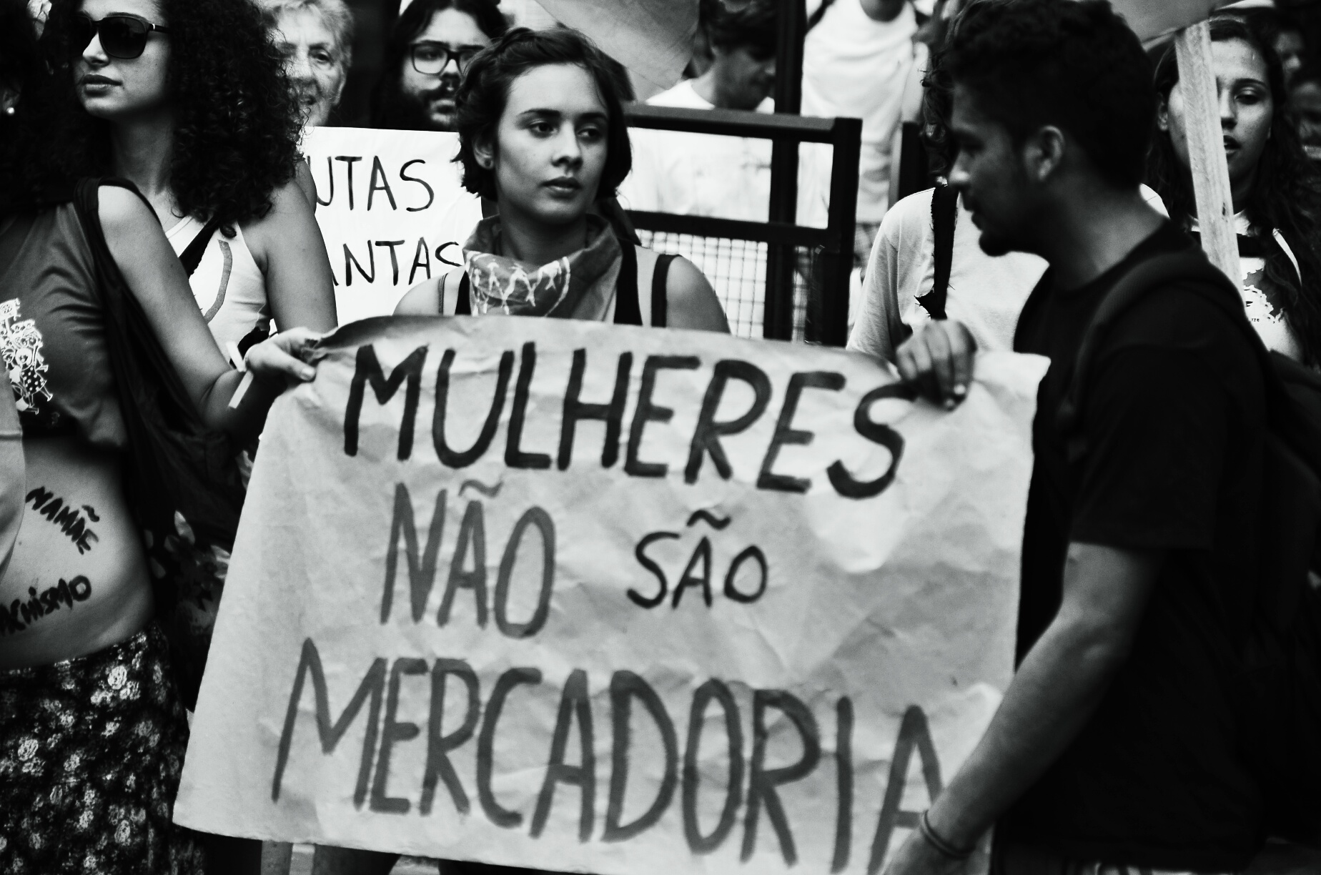 Bloco das Mulheres na Luta contra a Violência do Estado, partindo da Praça da Estação. 08/03/2013 (CC BY-SA) Maria Objetiva/Fora do Eixo